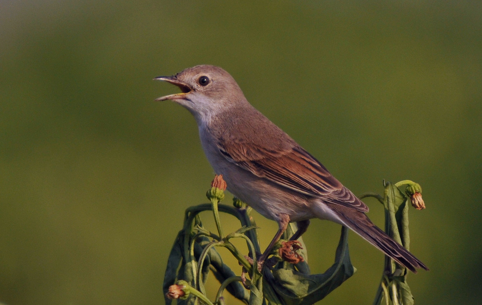 Kurdî: Li gundê Keperî ye hatiye kişandin.